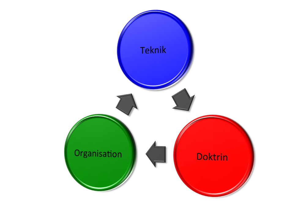 Skiss av de tre delar som, enligt R.O. Hundley, krävs för revolution in military affairs (RMA).